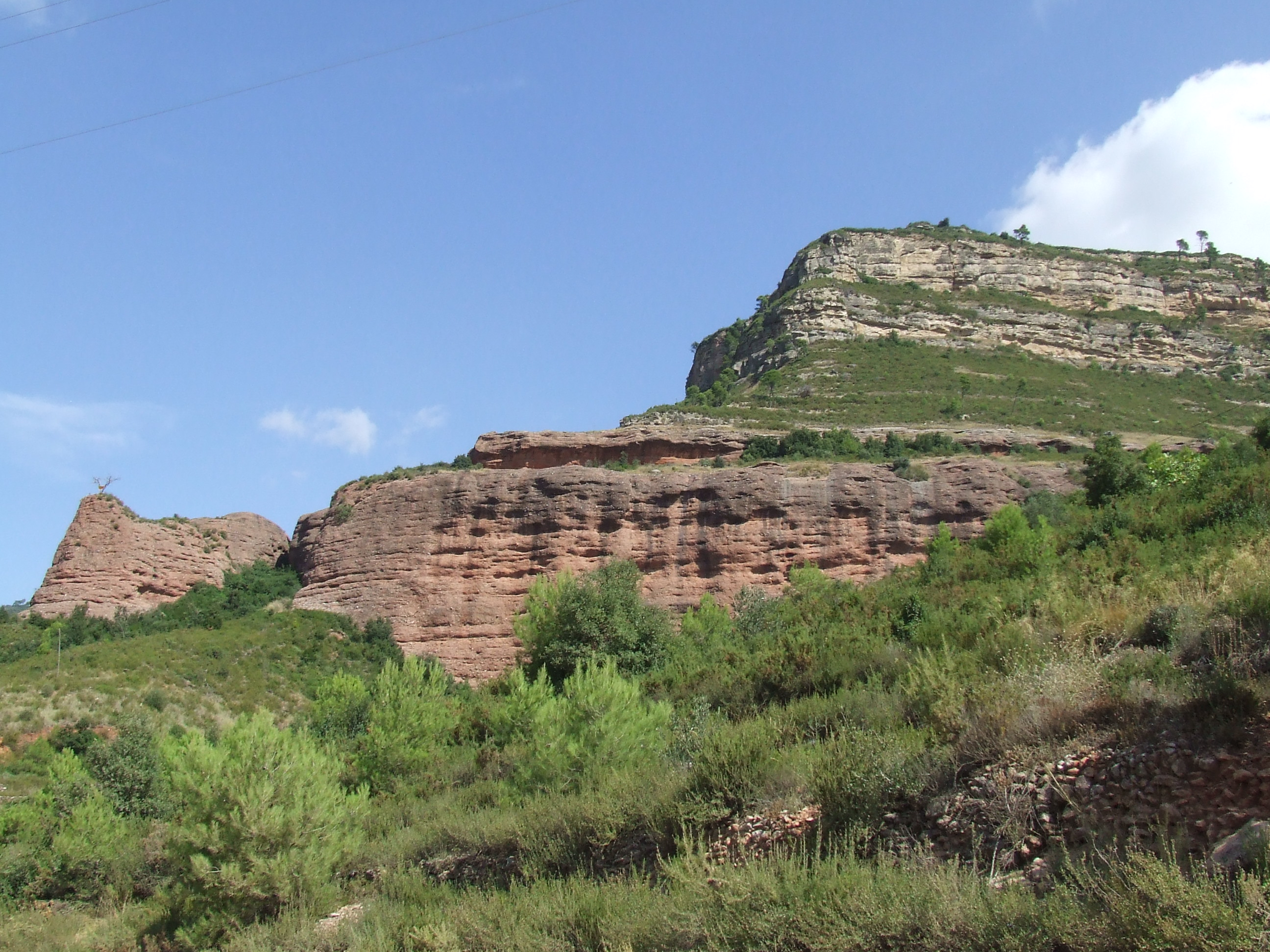 Els Cingles de Bertí damunt de la Madella (Riells del Fai, Bigues i Riells, Vallès Oriental)